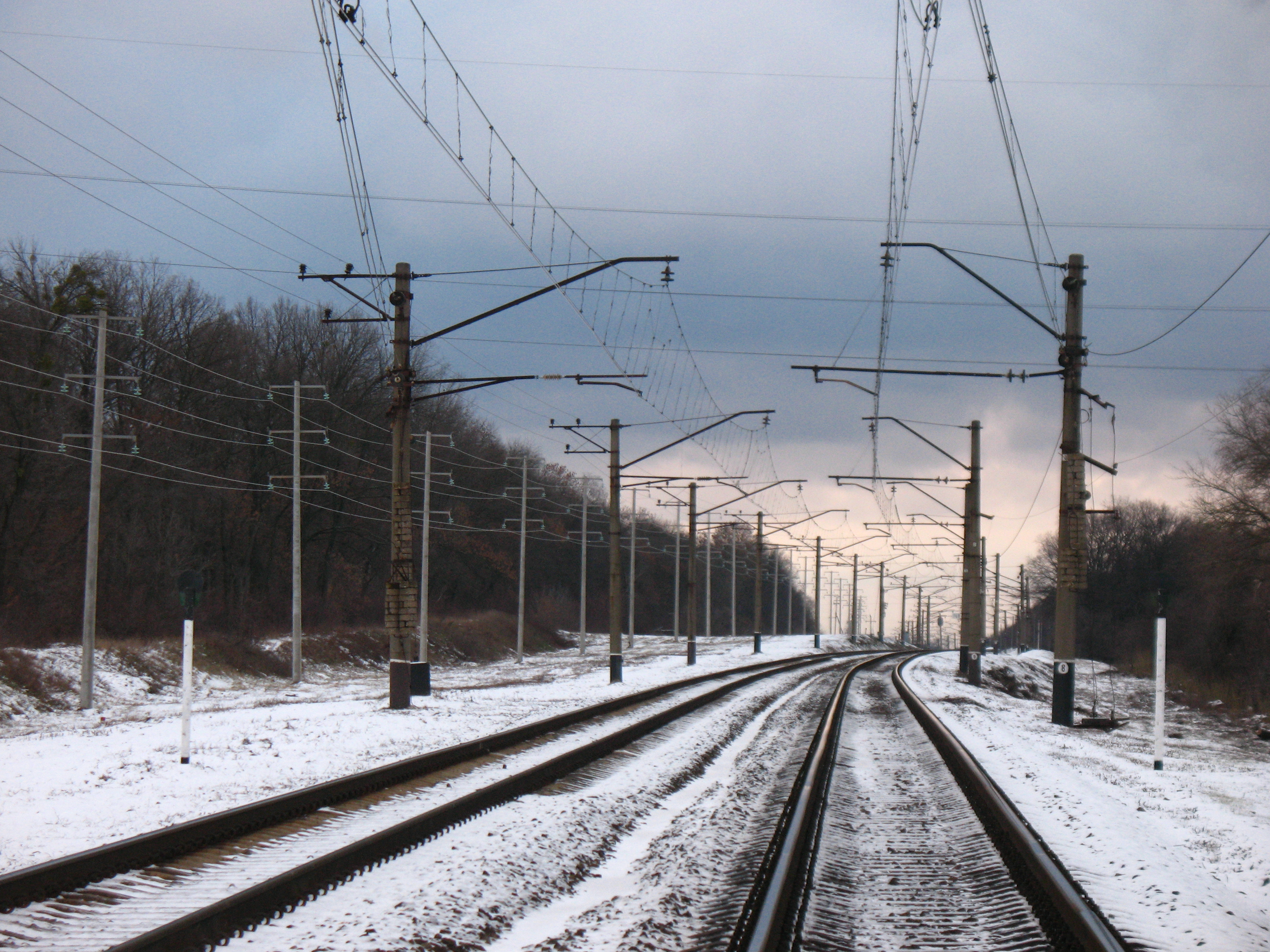 Курско-Харьково-Азовская ж.д. Вид в сторону Харькова между Дергачами и Лозовеньками.